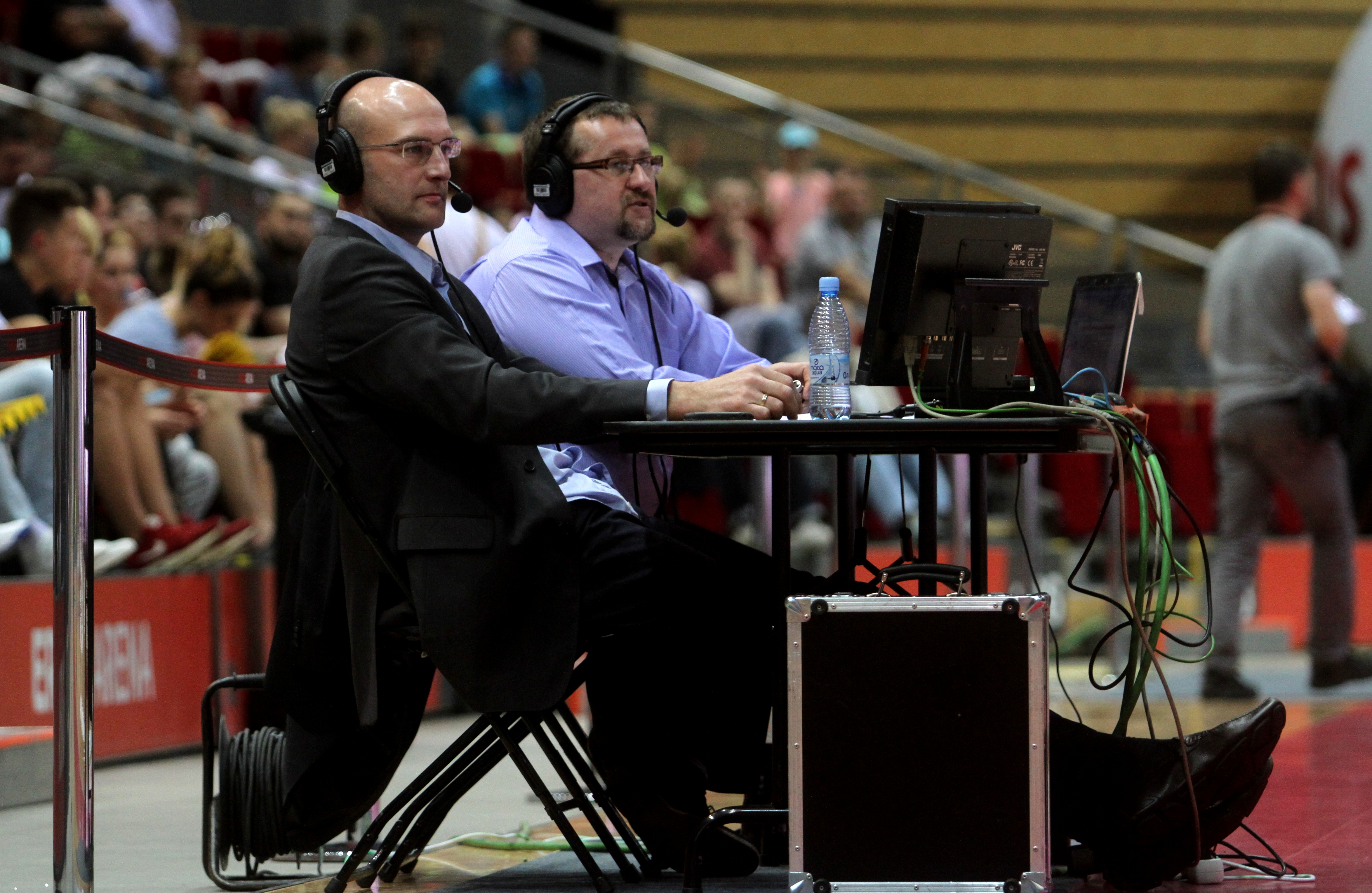 Arkadiusz Miłoszewski i Adam Romański komentatorzy Poslatu Sport News z meczów Tauron Basket Ligi